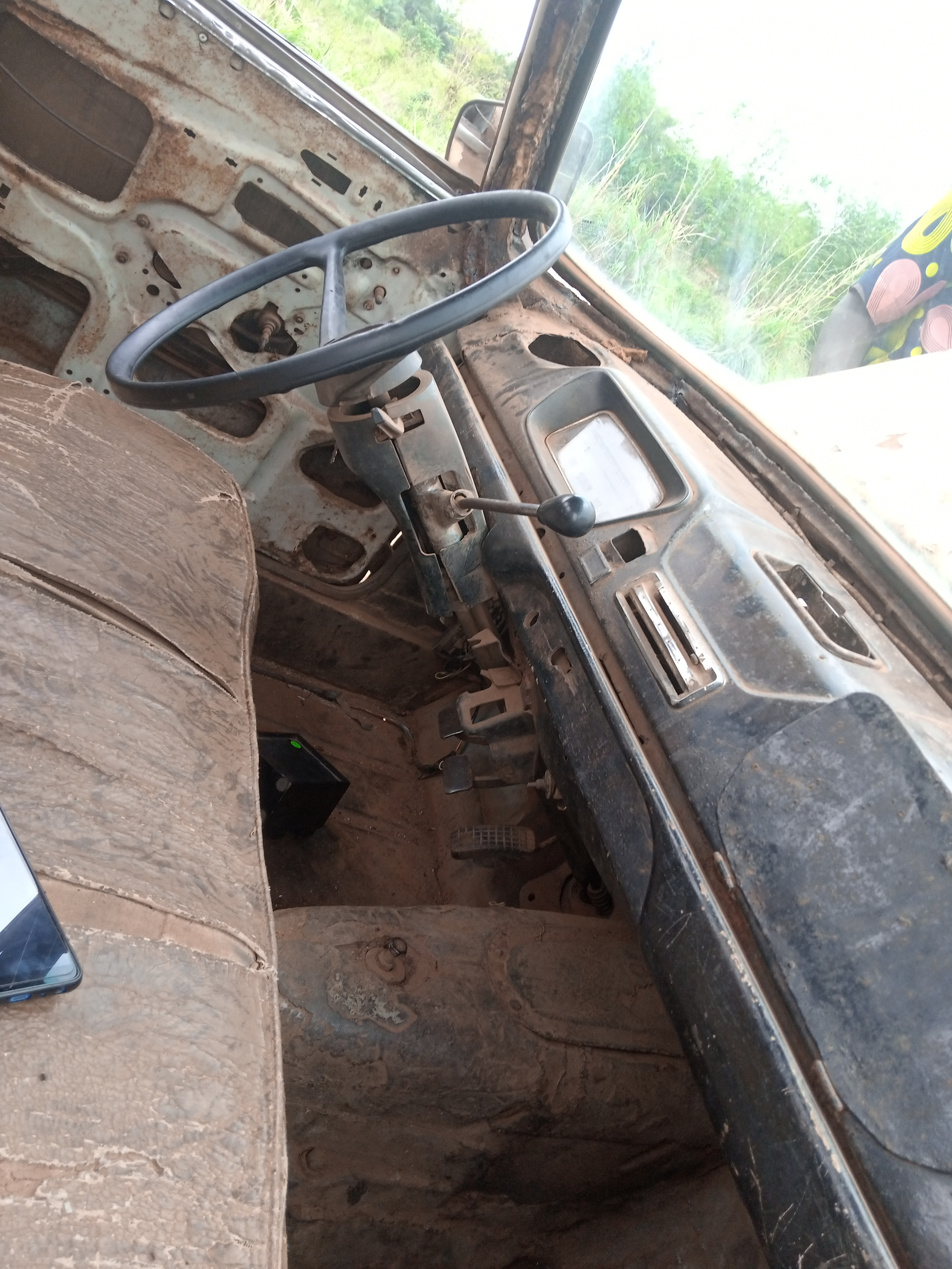 le transport à Pobé au Bénin This is an image with the theme "Africa on the Move or Transport" from: Benin